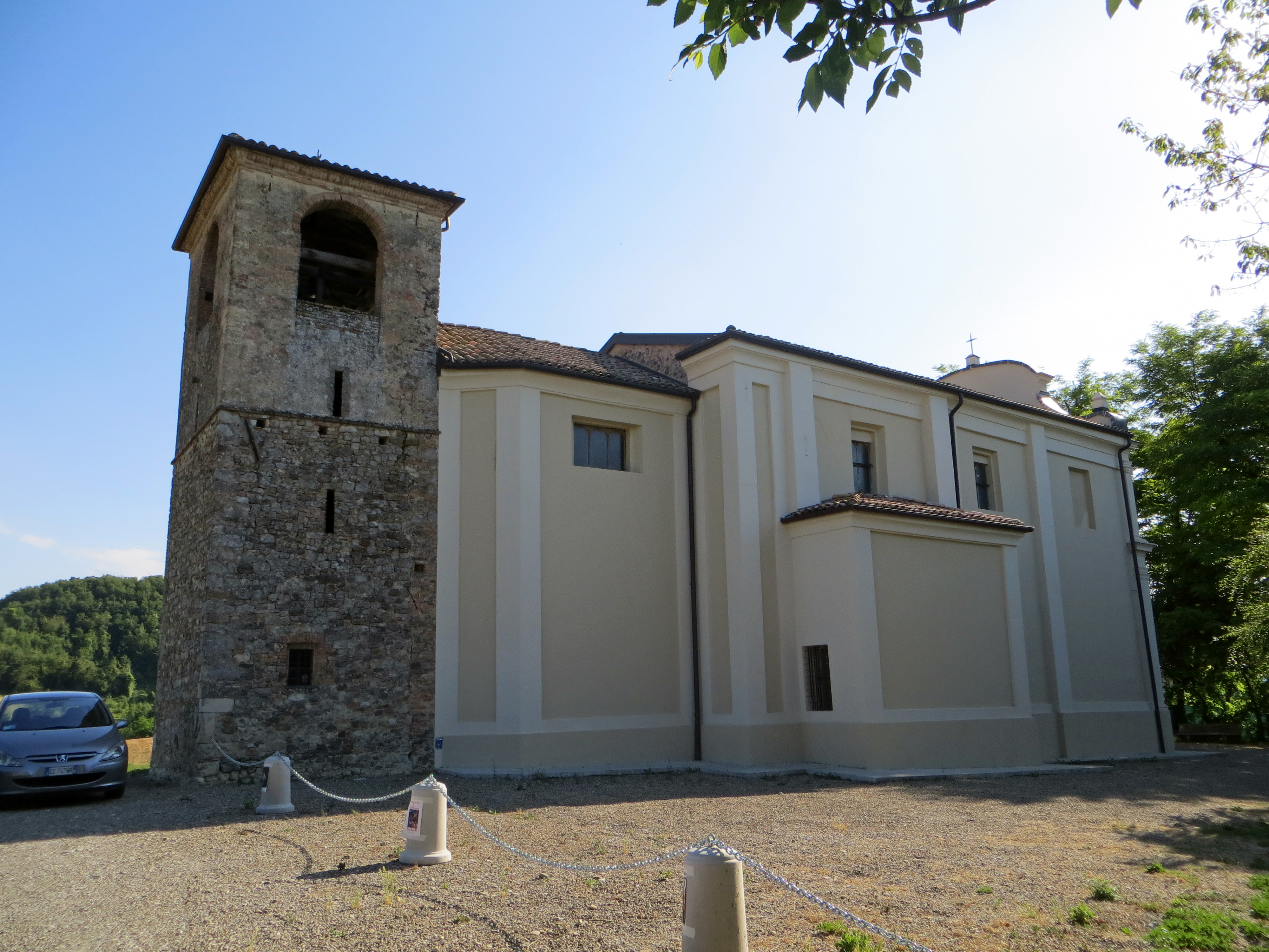 Chiesa di San Lorenzo (Guardasone, Traversetolo) - lato nord e campanile